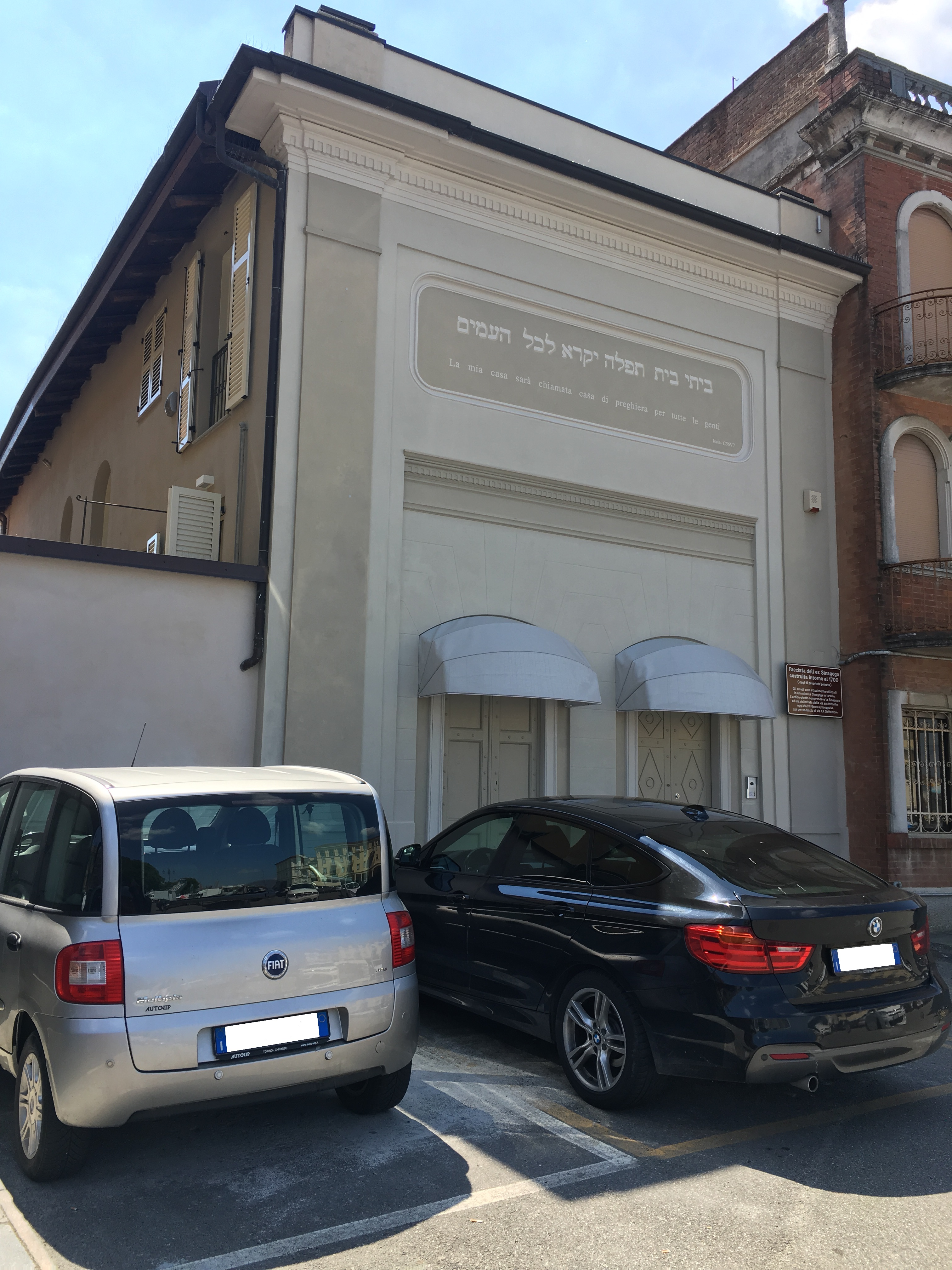 Ex sinagoga di Moncalvo, Piemonte, Italia